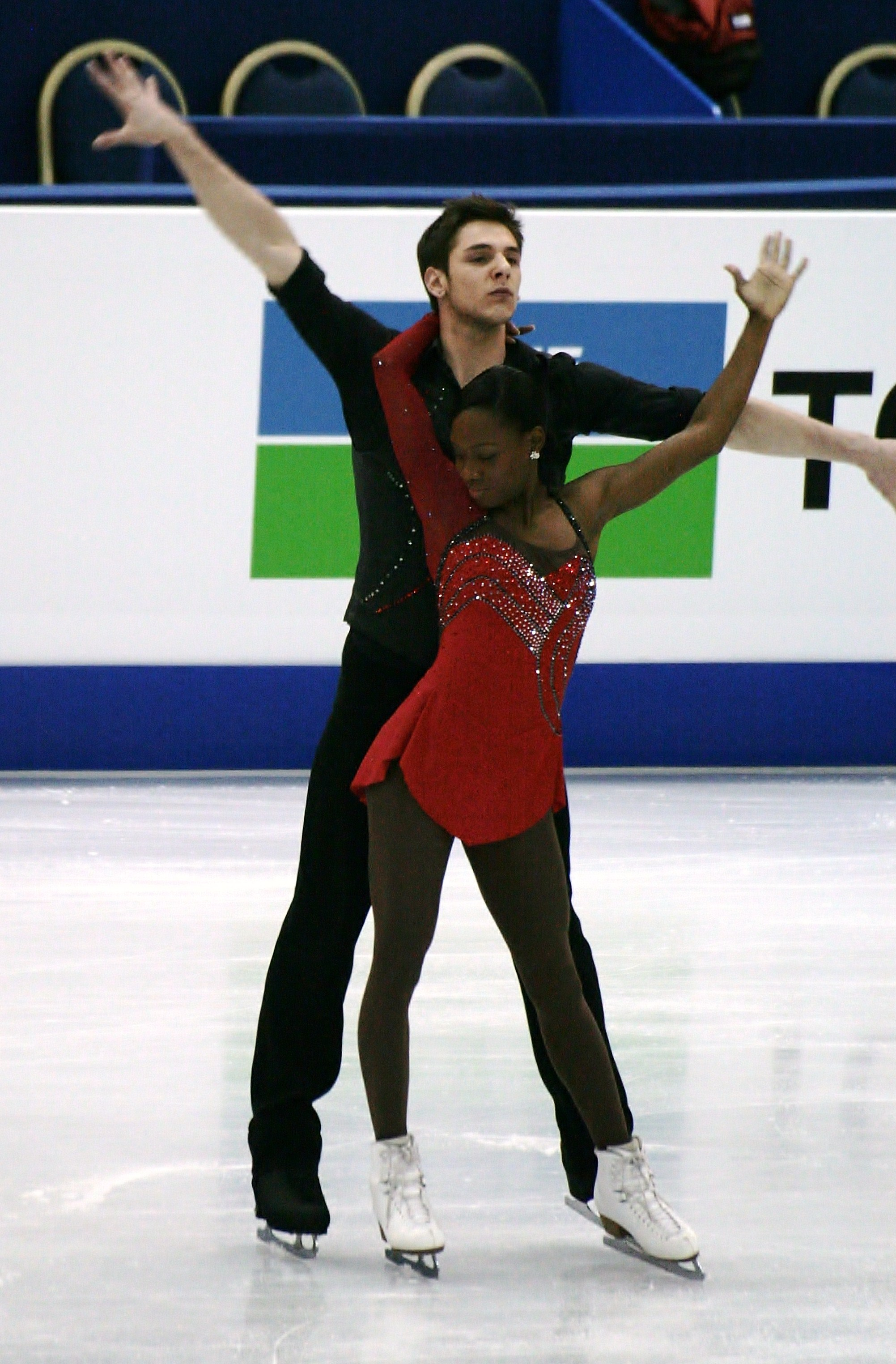 Ванесса Джеймс и Морган Сипре (Франция) на чемпионате мира по фигурному катанию 2012